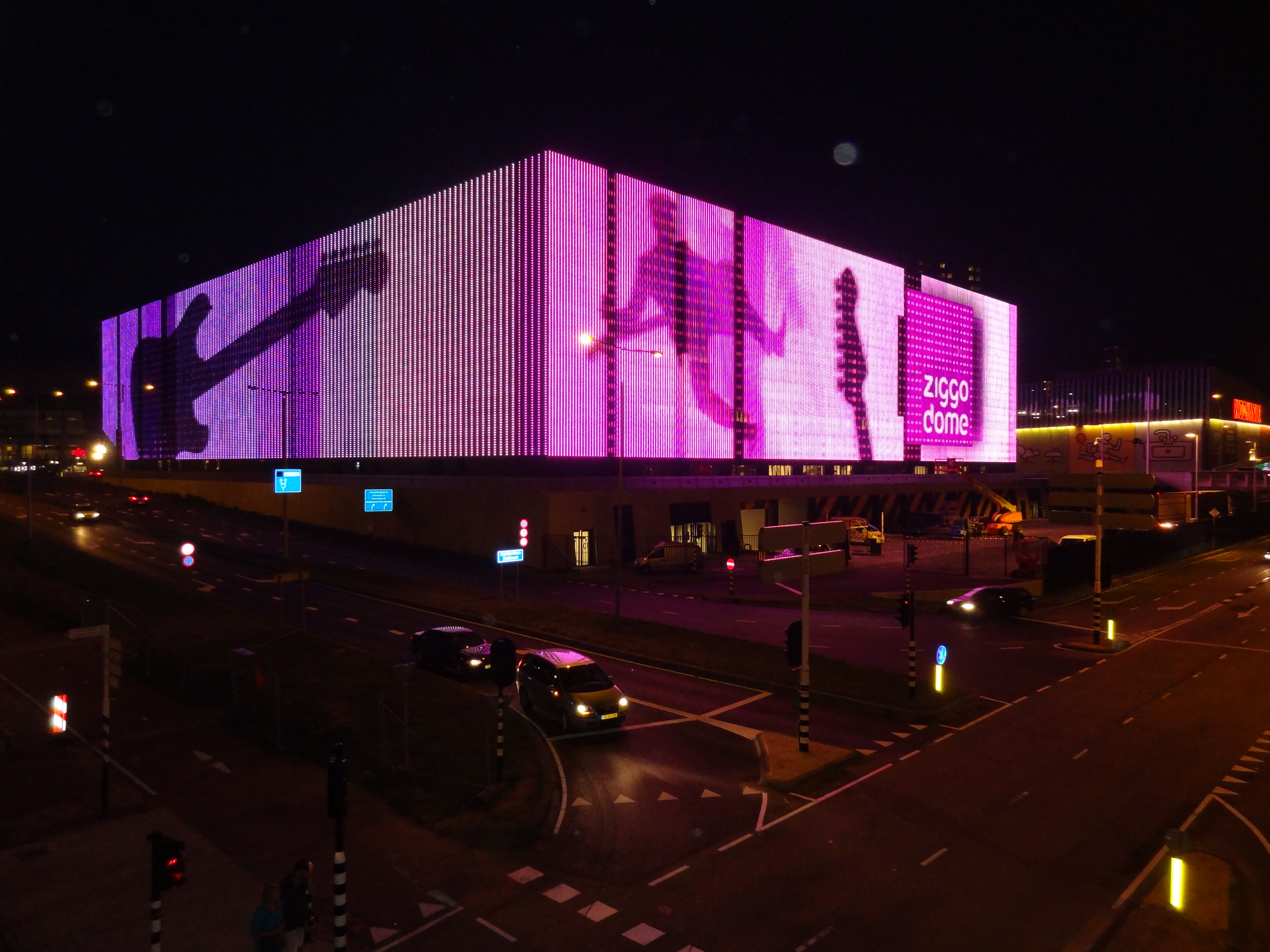 Ziggodome Amsterdam